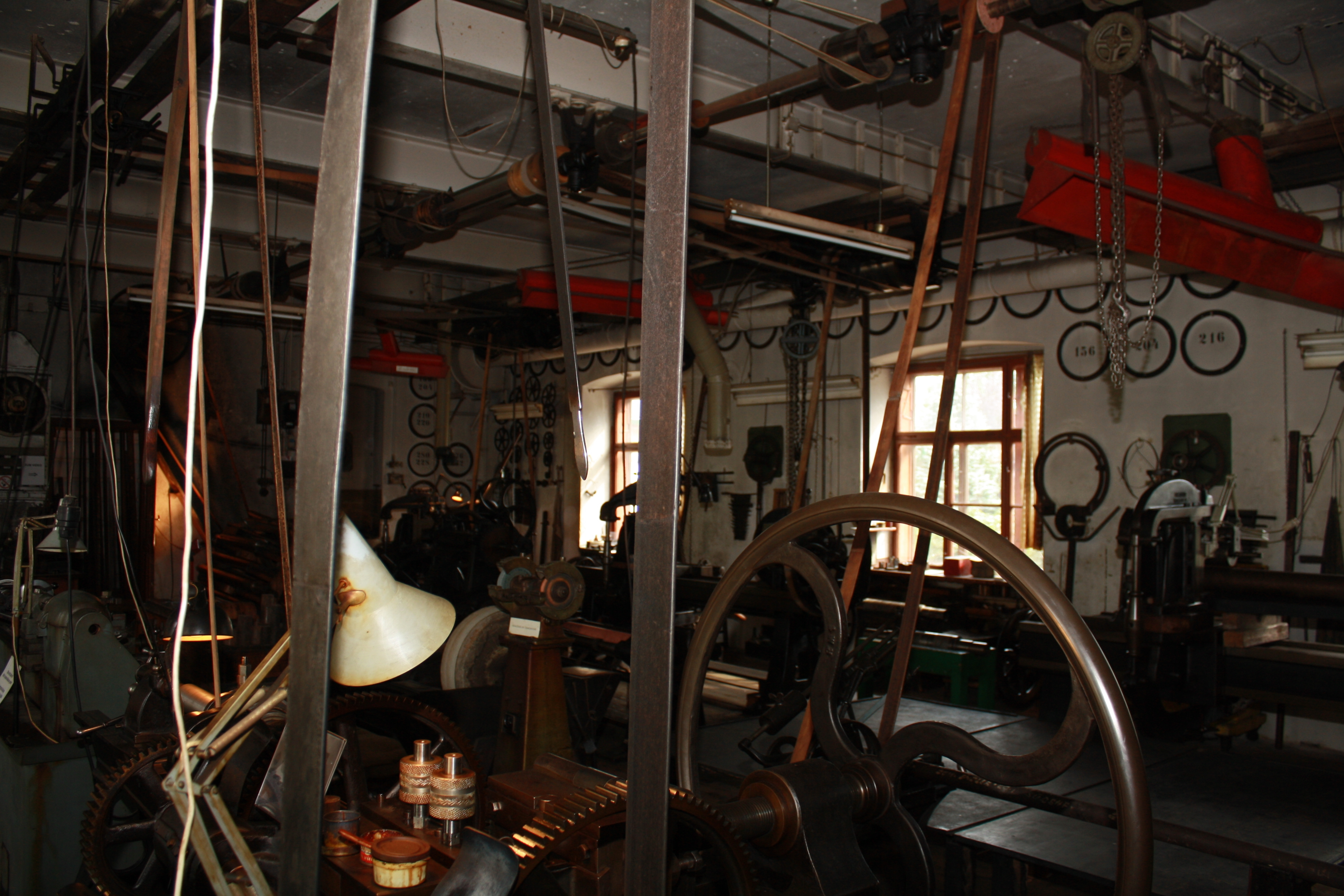 Maschinenraum mit Transmission im Museum:Walzengravieranstalt Guntramsdorf in Niederösterreich